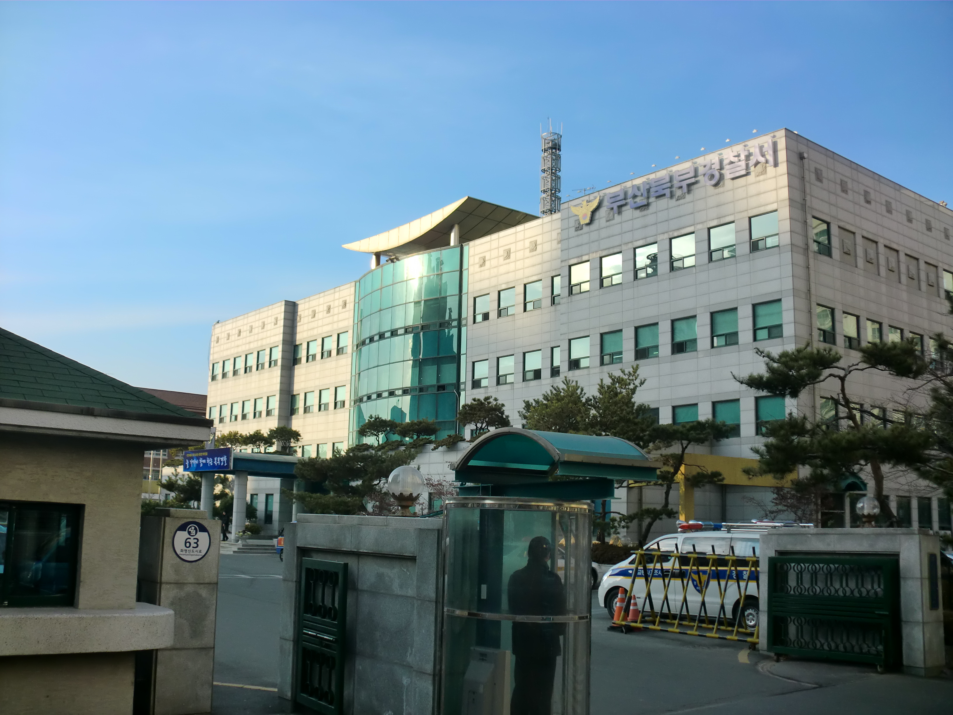 부산광역시 북구에 있는 부산북부경찰서